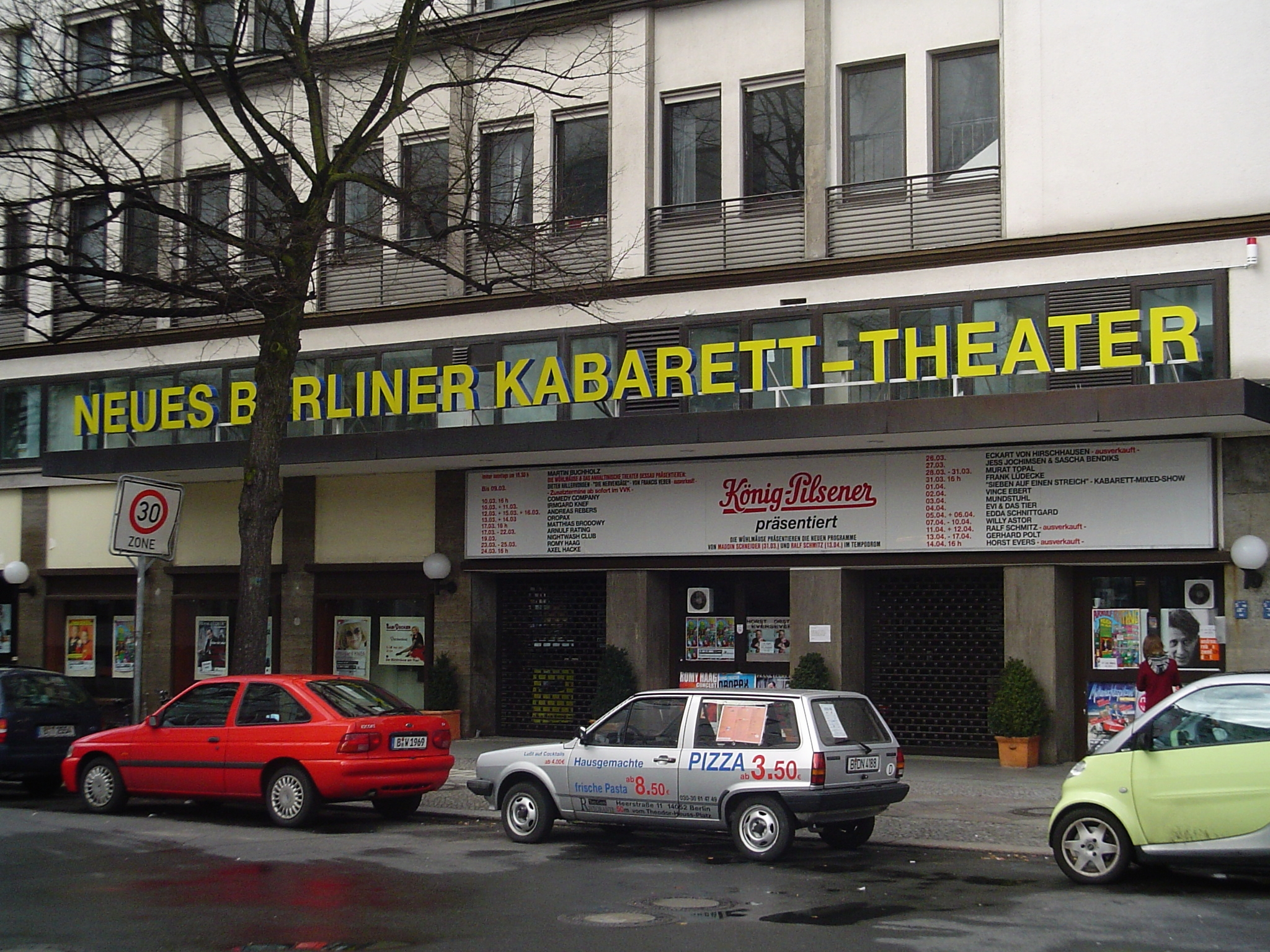 Spielstätte des Kabaretts "Die Wühlmäuse" in Berlin-Westend, Aufnahme von Osten. Die Wühlmäuse werden unter dem Bier-Werbungsschriftzug genannt.